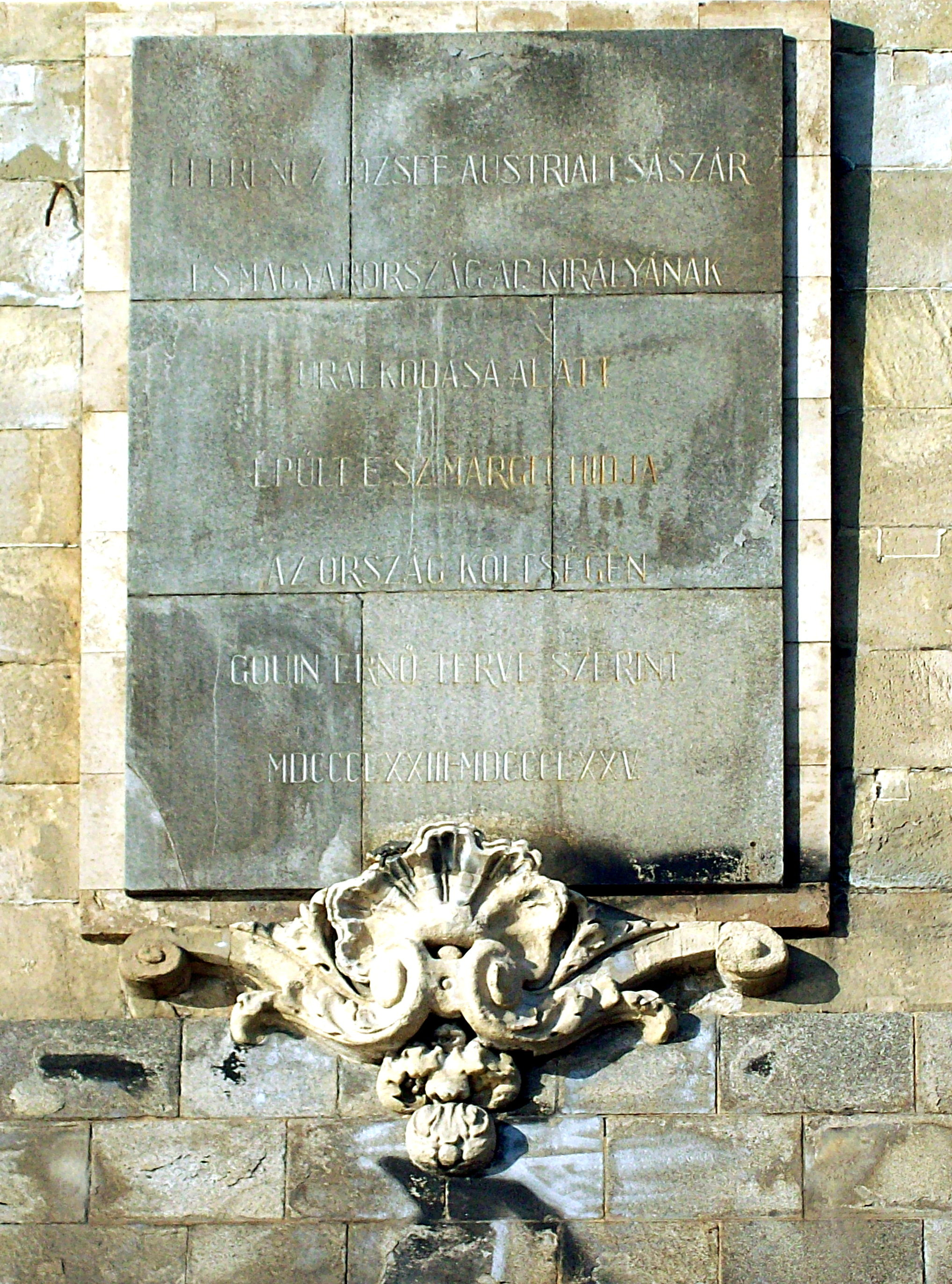 A Margit híd középpillérének déli oldalán álló - mára már megkopott - építési emléktábla. A szöveg: „I. Ferencz József austriai császár és Magyarország ap. királyának uralkodása alatt épült e Sz. Margit hidja az ország költségén Gouin Ernő terve szerint MDCCCLXXIII-MDCCCLXXV”